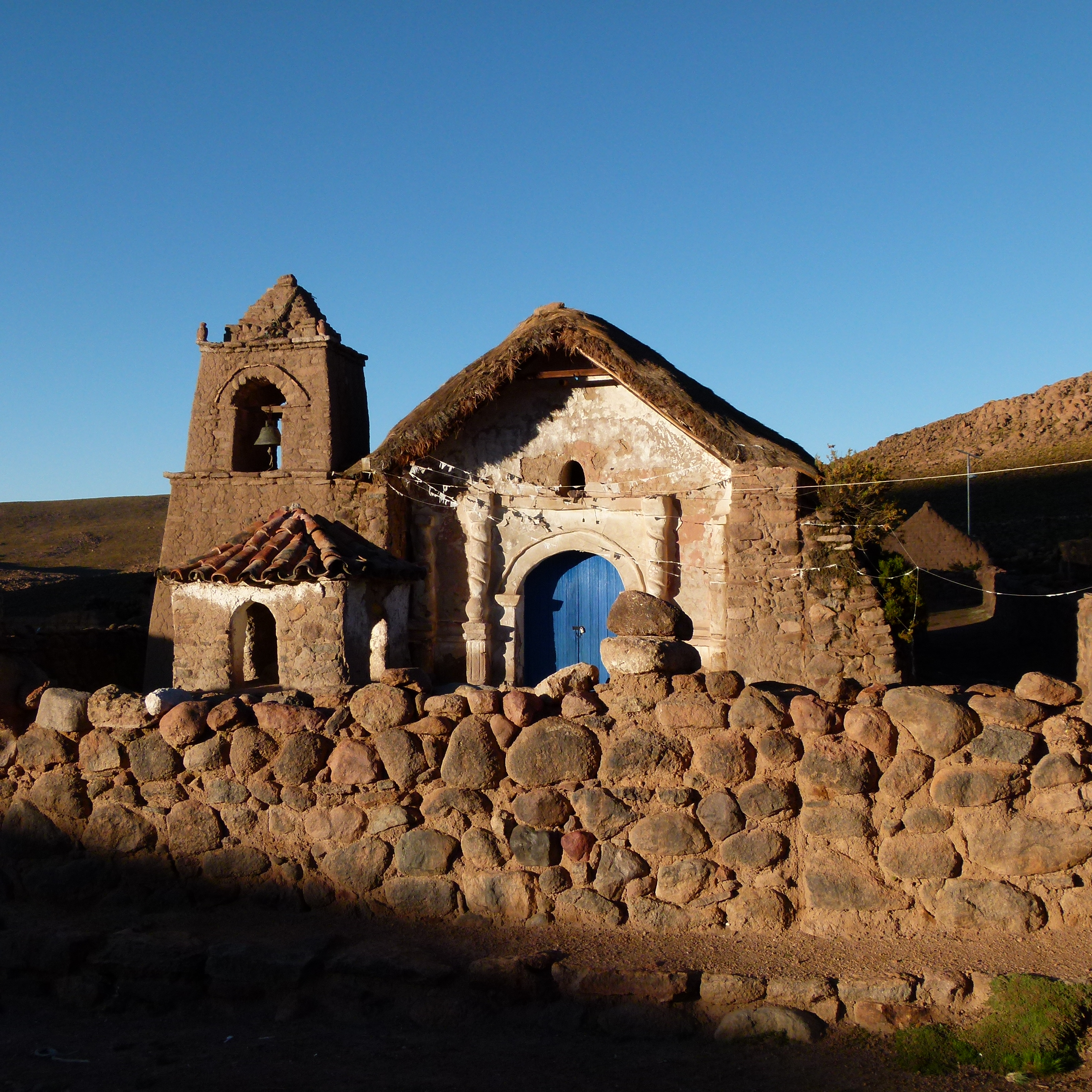 Iglesia de Mulluri This is a photo of a national monument in Chile: 969